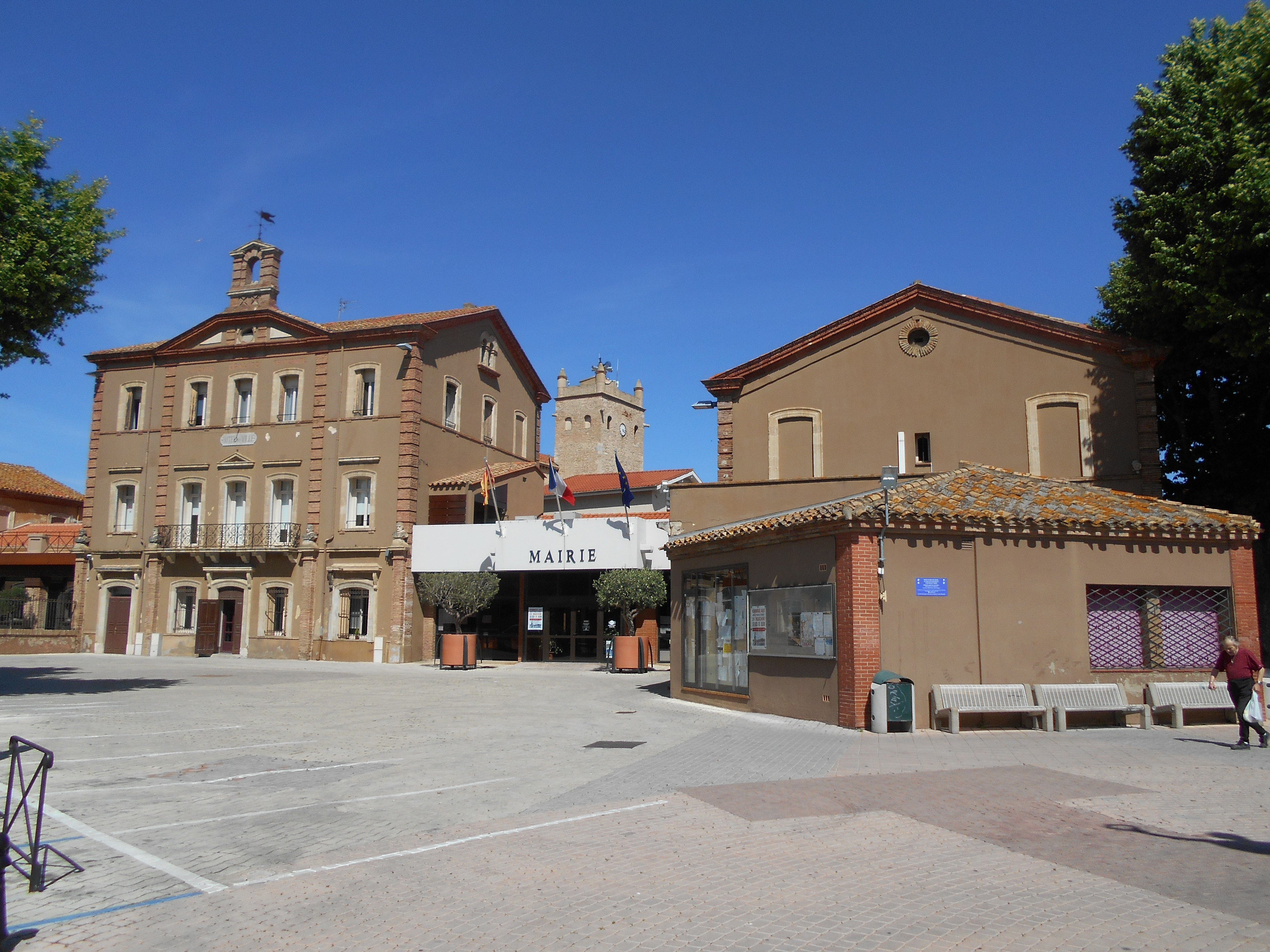 La Casa del Comú de Sant Llorenç de la Salanca